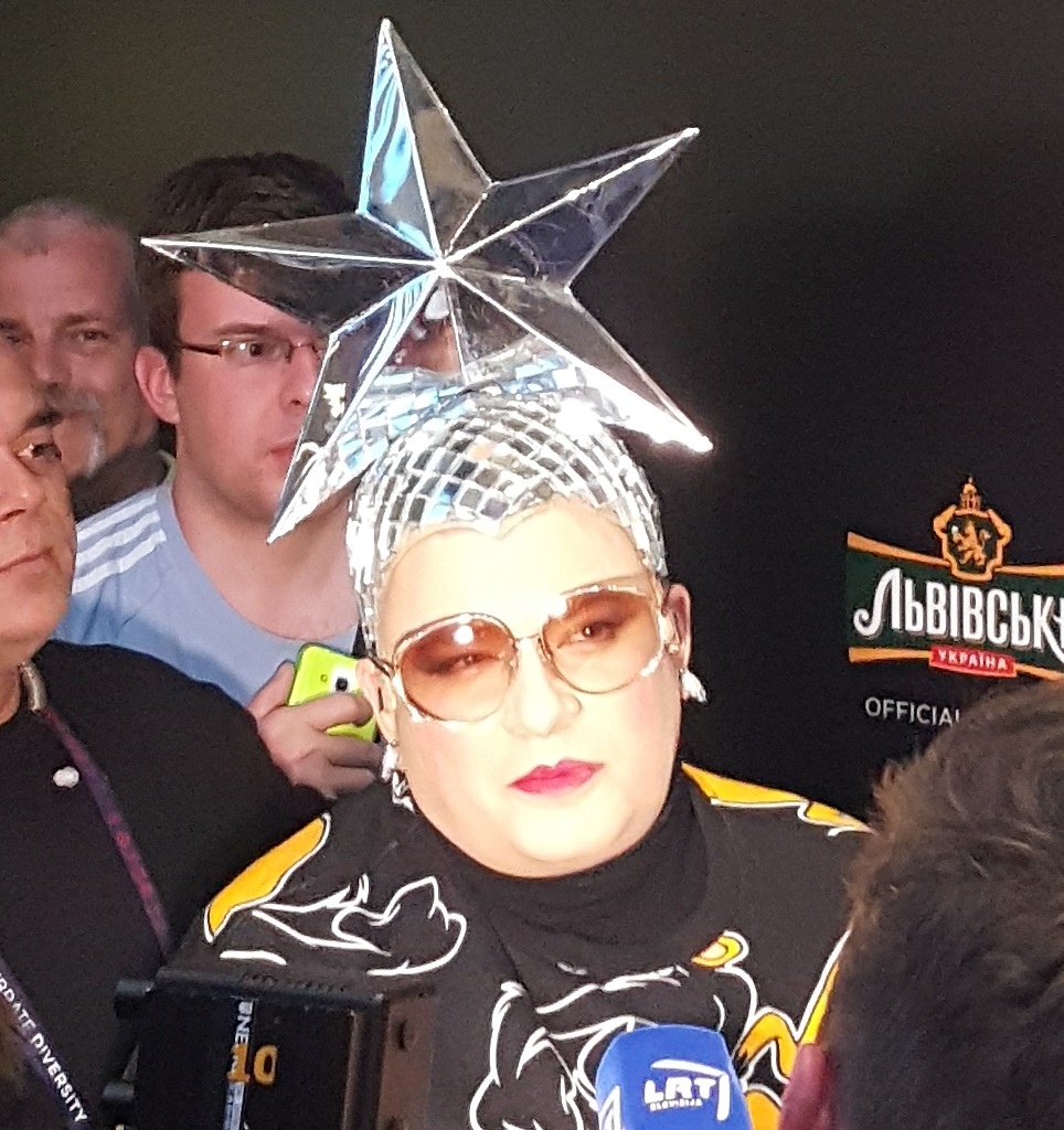 Ukraińska drag queen Verka Serduchka, maj 2017